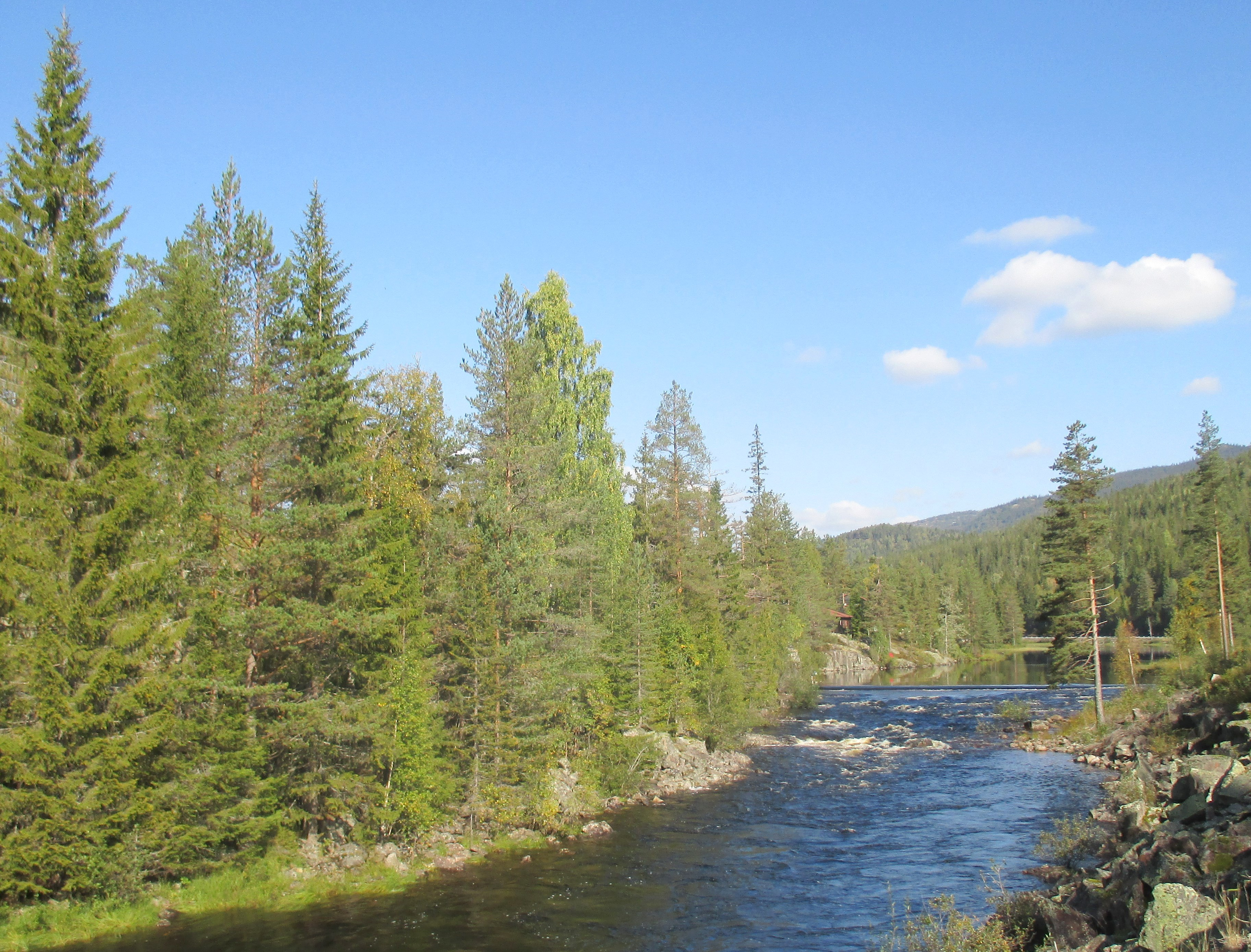 Skogsåi